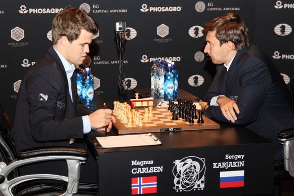 Карлсен - Карякин, 8 партия